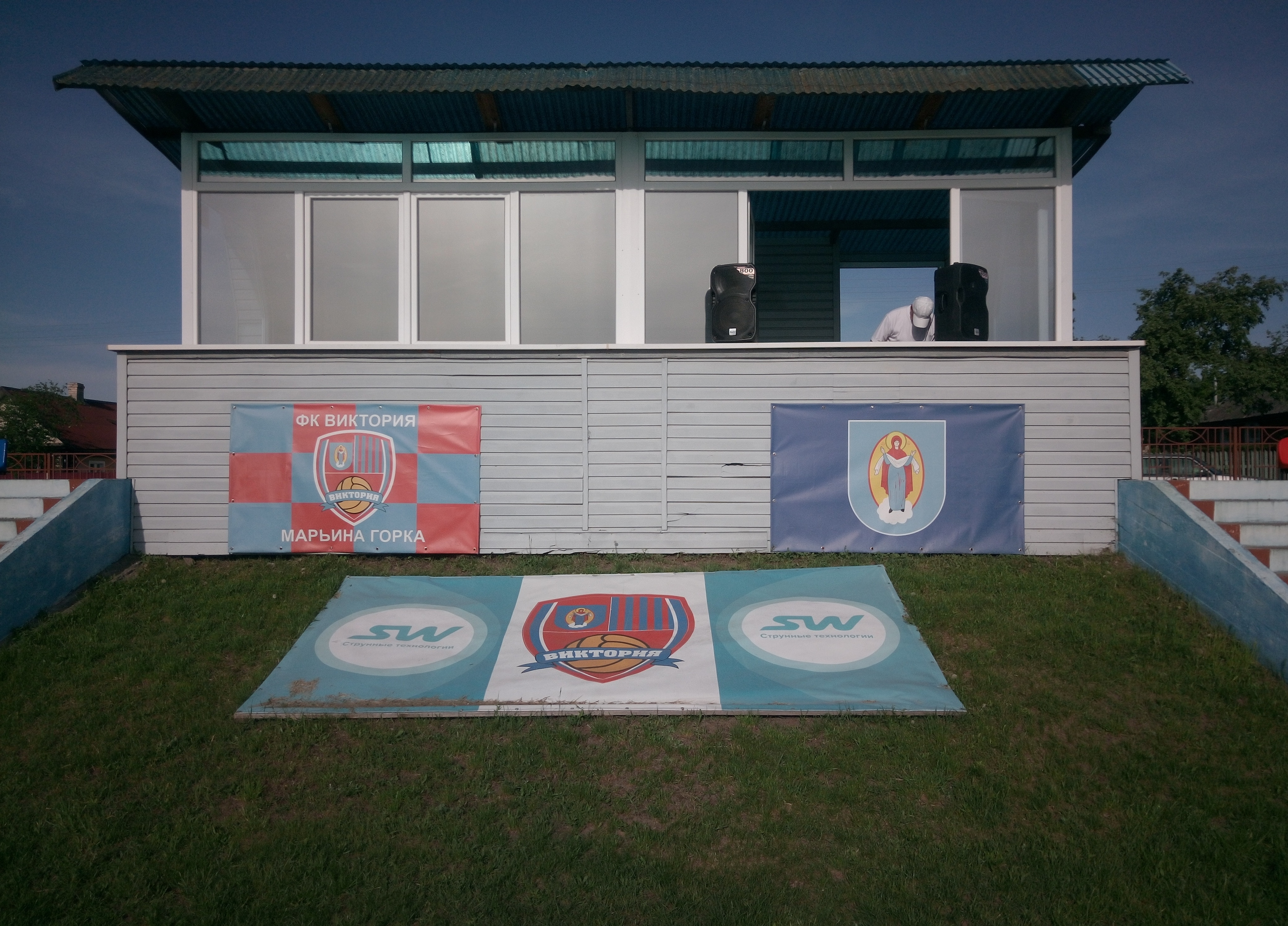 Кабінка для каментатараў